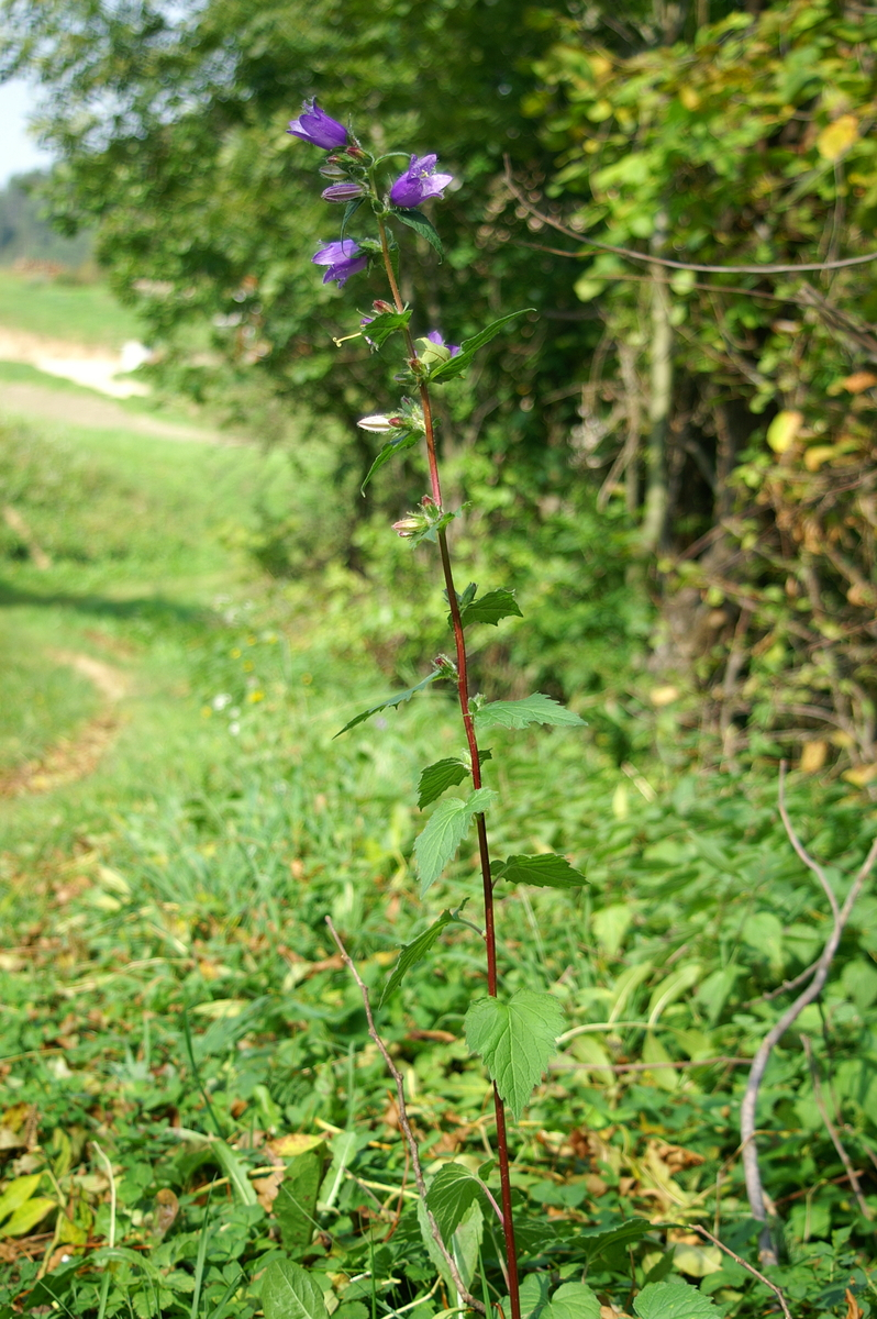 Koprivasta zvončica v Gonteh.